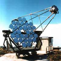 Telescopi suolo